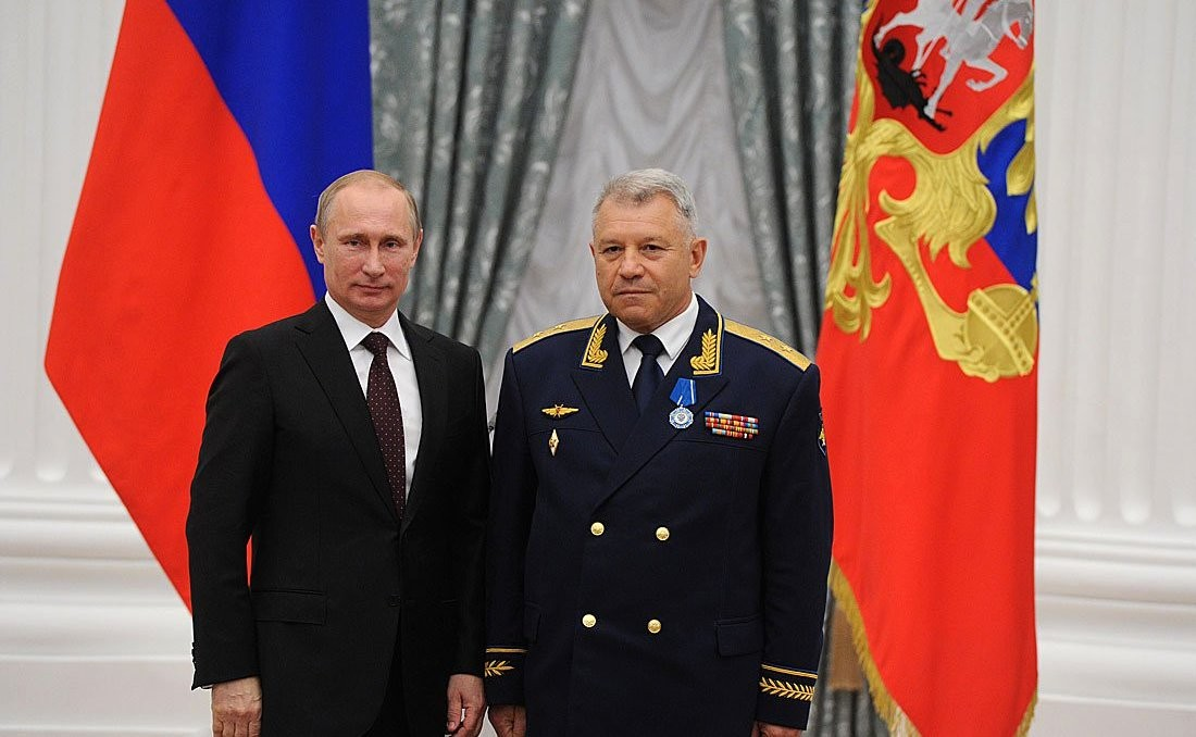 Советский и российский военный деятель Айтеч Бижев и президент России Владимир Путин в Кремле на церемонии вручения А. Бижеву ордена Почёта. 31 июля 2014 года.